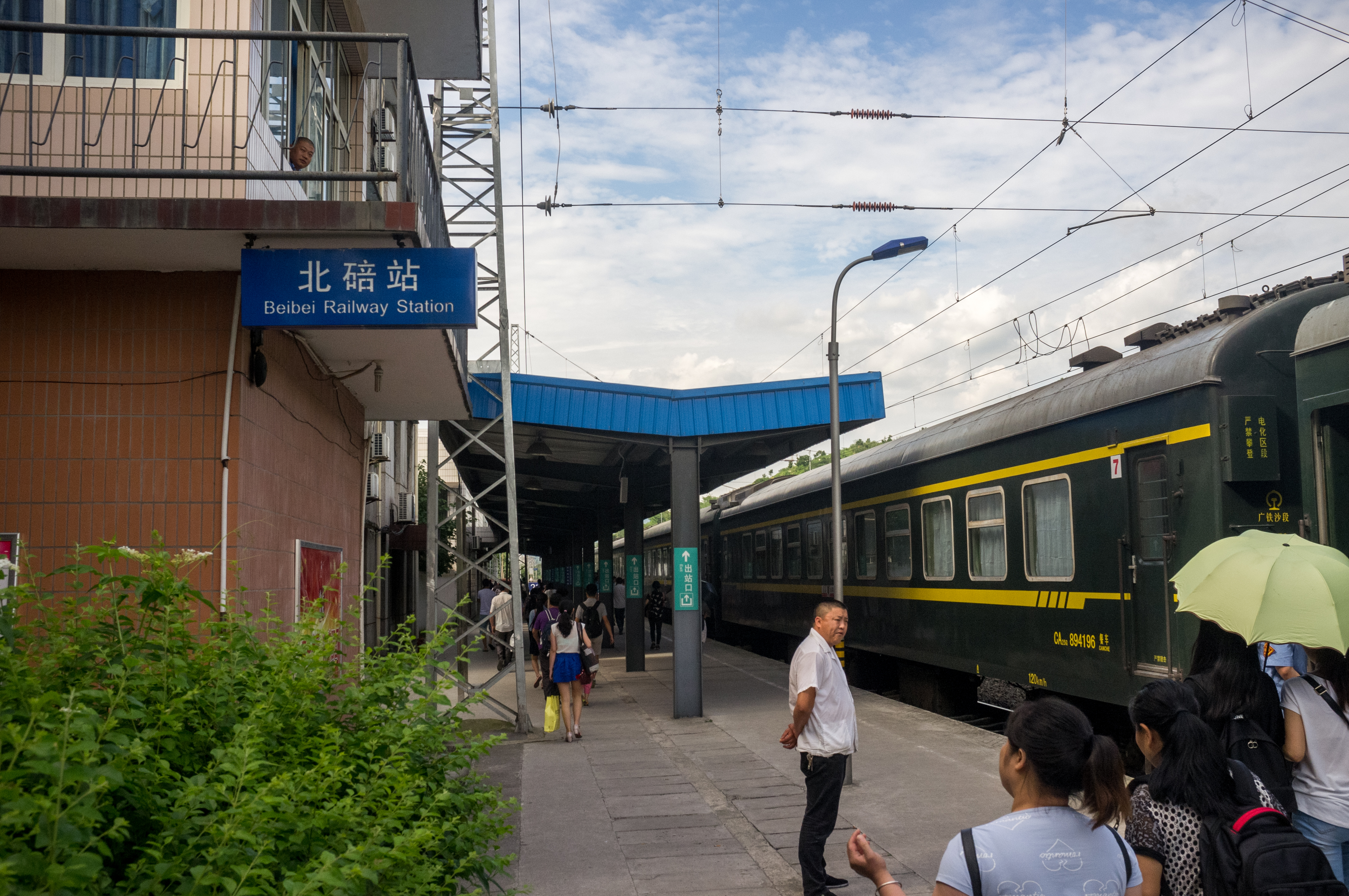 中文（中国大陆）: 国铁北碚站1站台